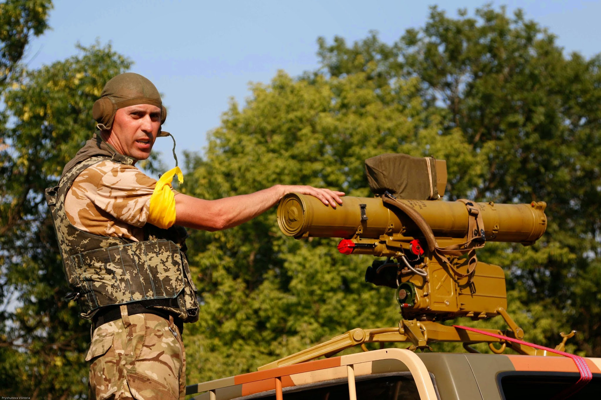 Батальон «Донбасс» под Первомайском